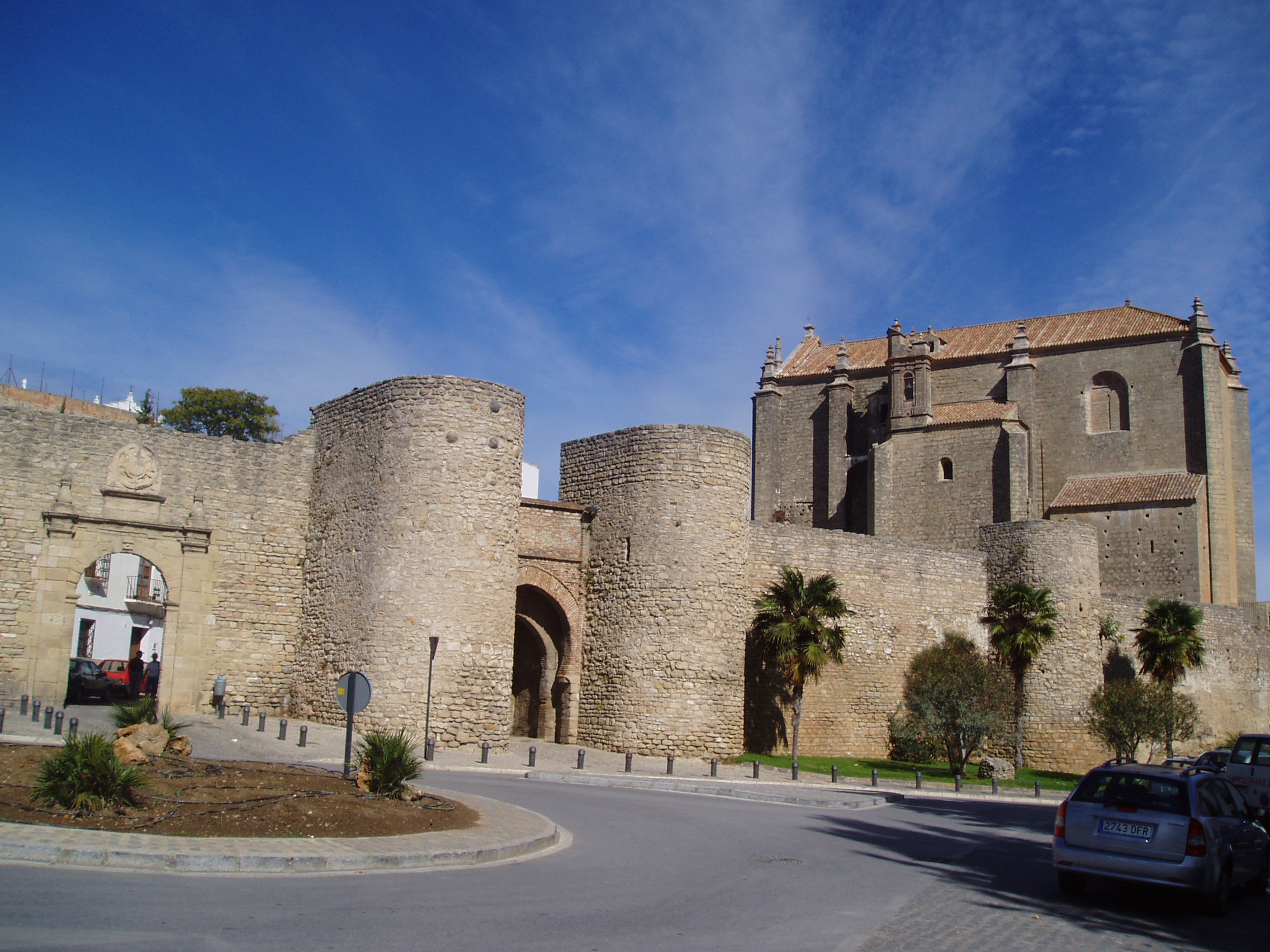 Imagen de Ronda, España. Iglesia del Espiritu Santo, Puerta de Carlos V y Puerta de Almocabar.